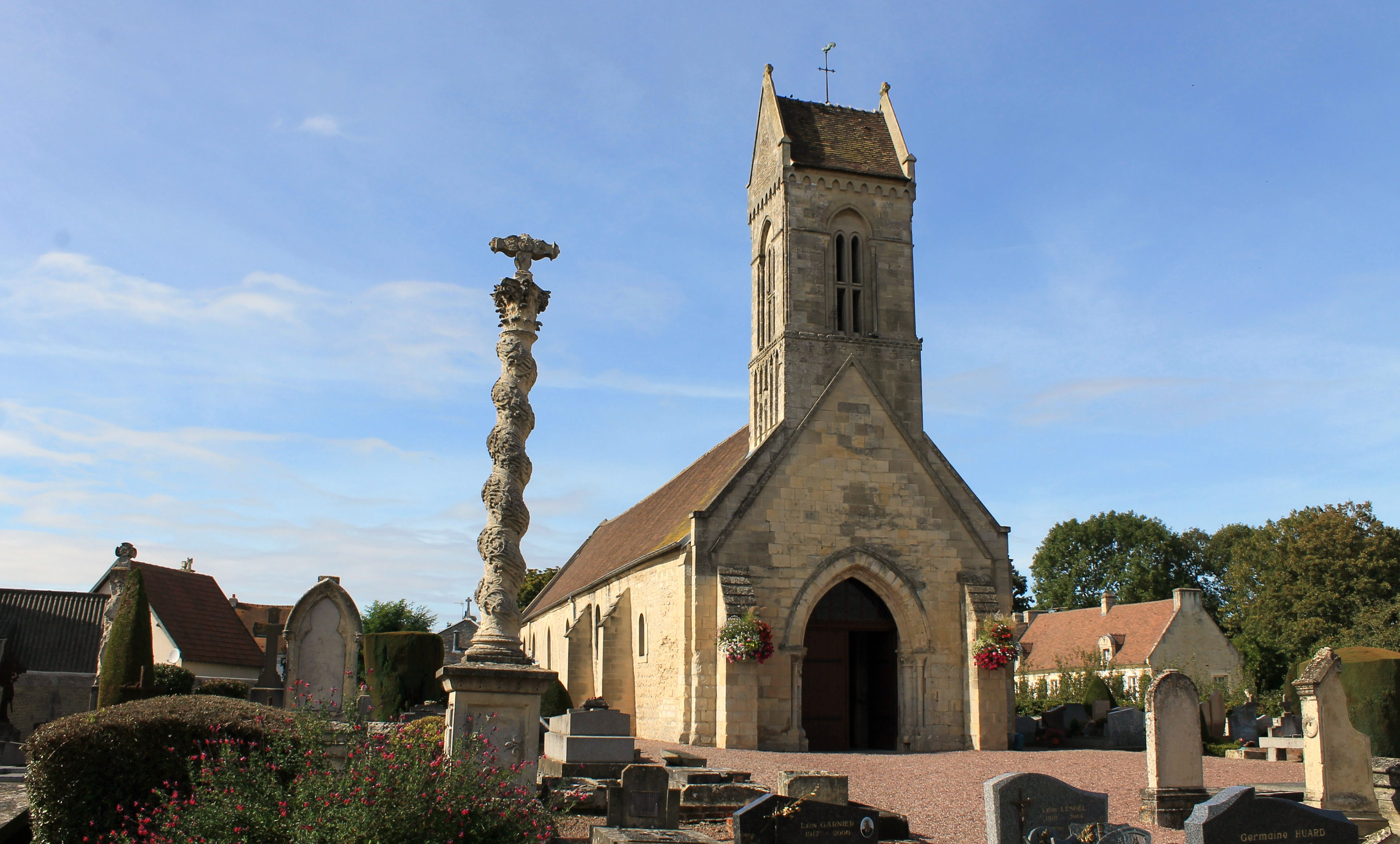 Église Saint-Vigor et croix de cimetière à Authie (Calvados)